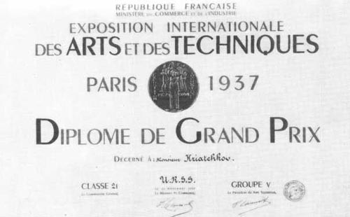 Диплом «Гран При», полученный А.Д.Крячковым на Международной Выставке в Париже, в 1937 году за проект 100-квартирного дома.